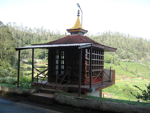 Pykara town, Ooty, Tamil Nadu, India.